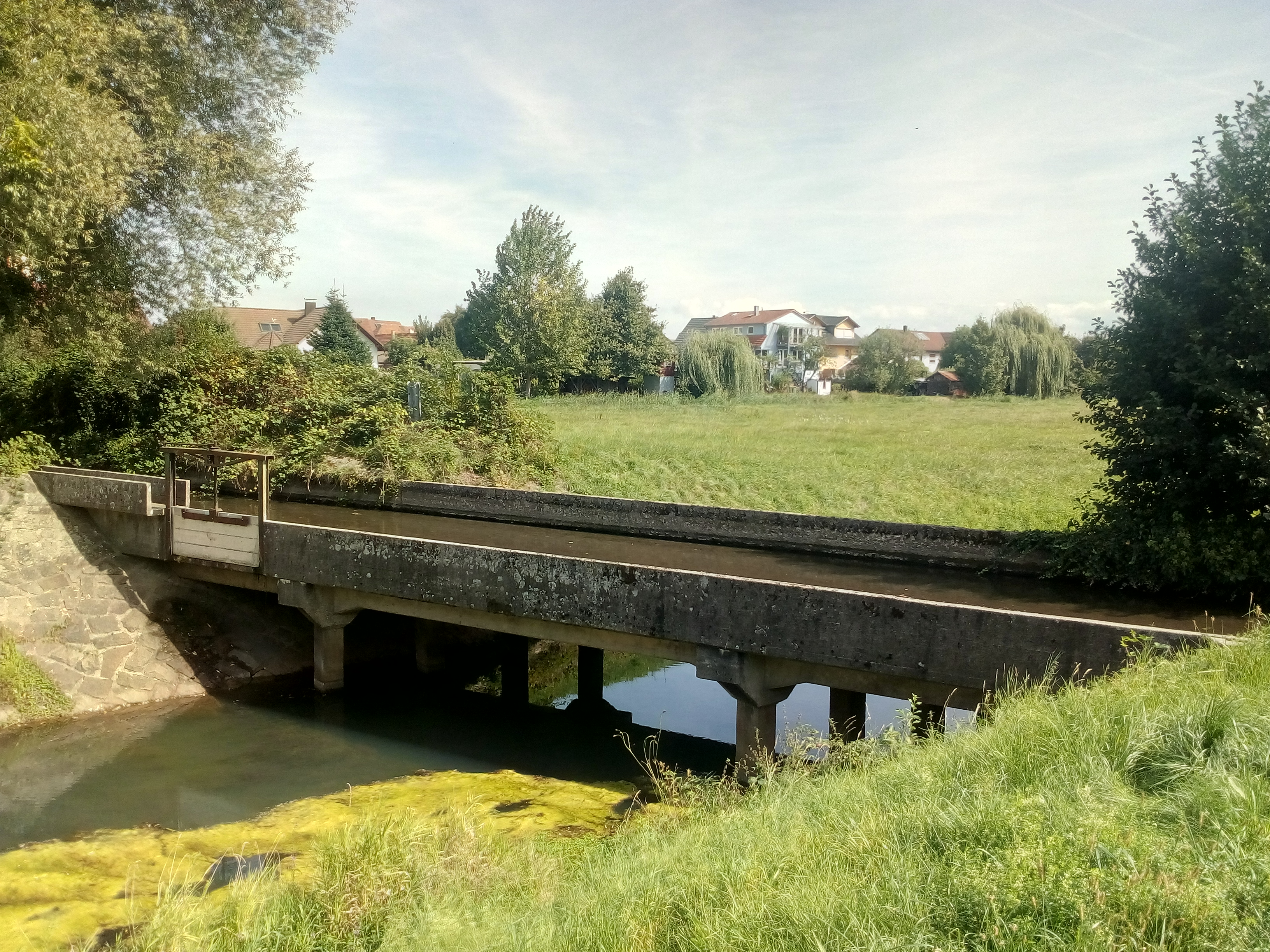 Aquädukt des Kanalbachs über den Scheidgraben bei Rheinmünster-Stollhofen, während der Acher-Rench-Korrektion errichtet.